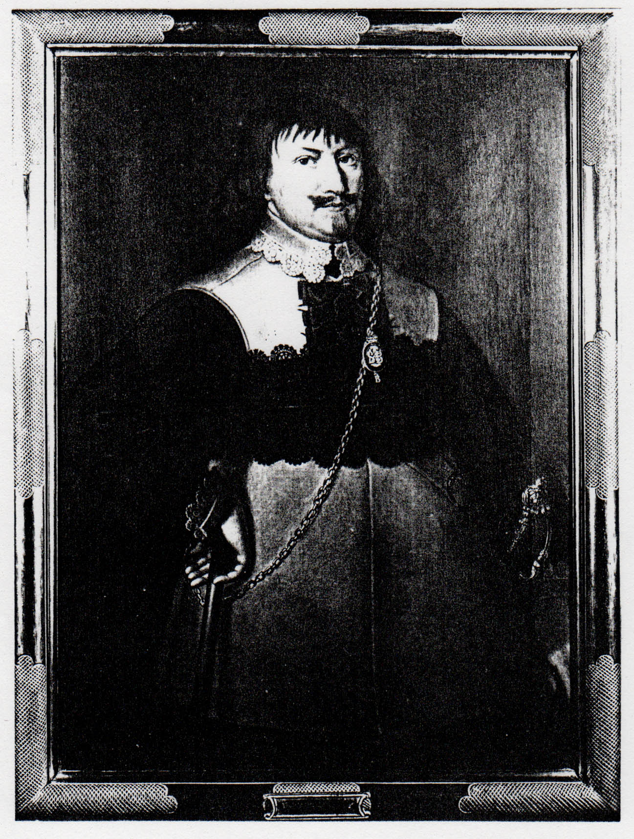 Kurt Bertram von Pfuel (1590–1658), General-Kriegskommissar und höchster Geheimrat des Großen Kurfürsten Friedrich Wilhelm von Brandenburg.